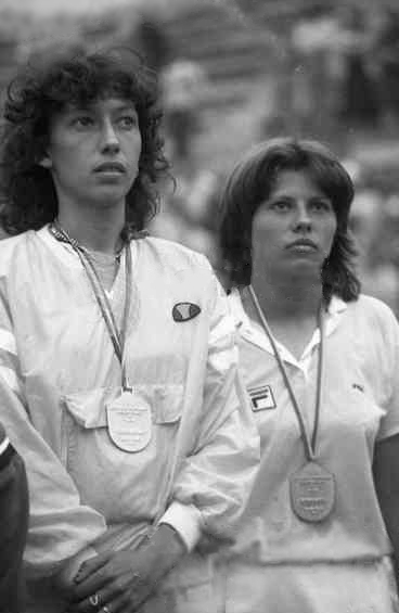 Summer Universiade in Bucharest. Virginia Ruzici and Florența Mihai (right)